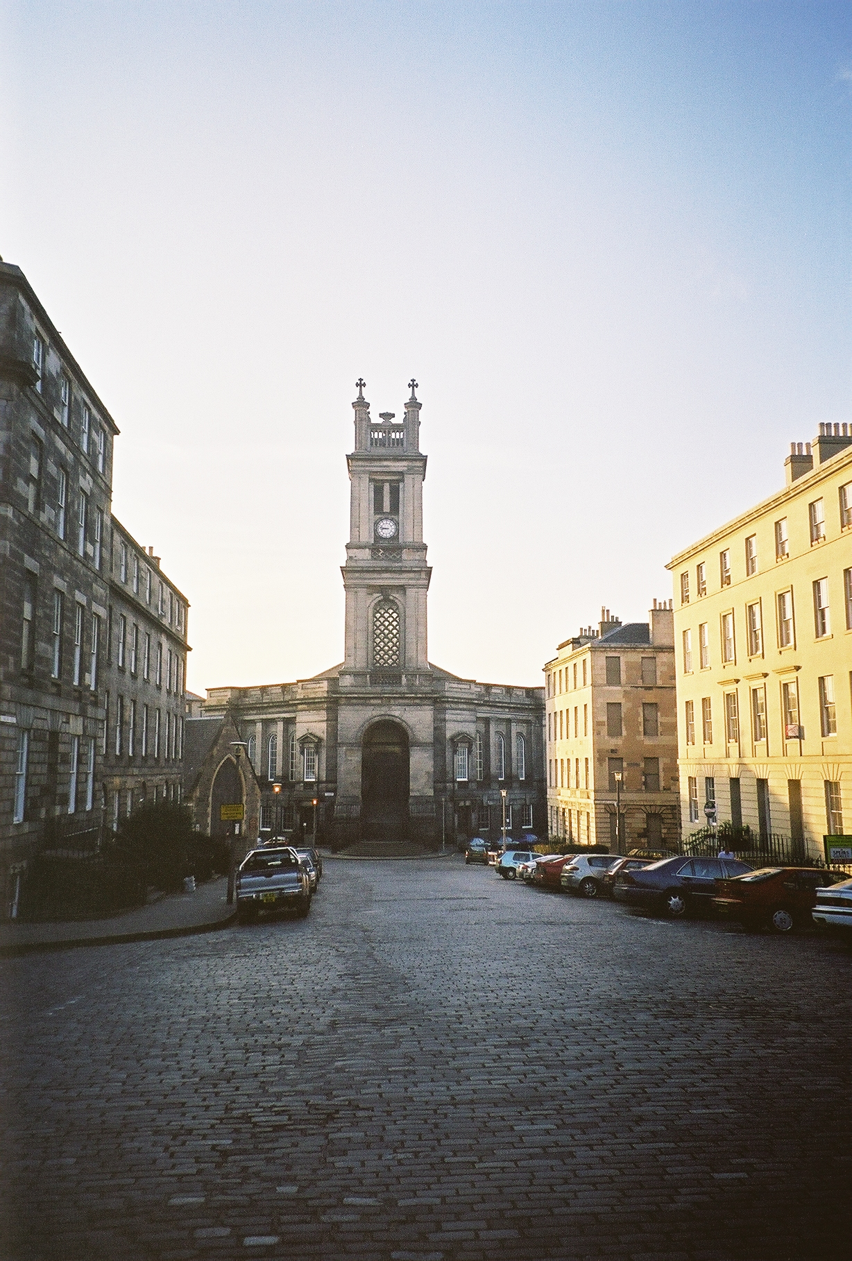 Saint Stephen's church, Edinburgh